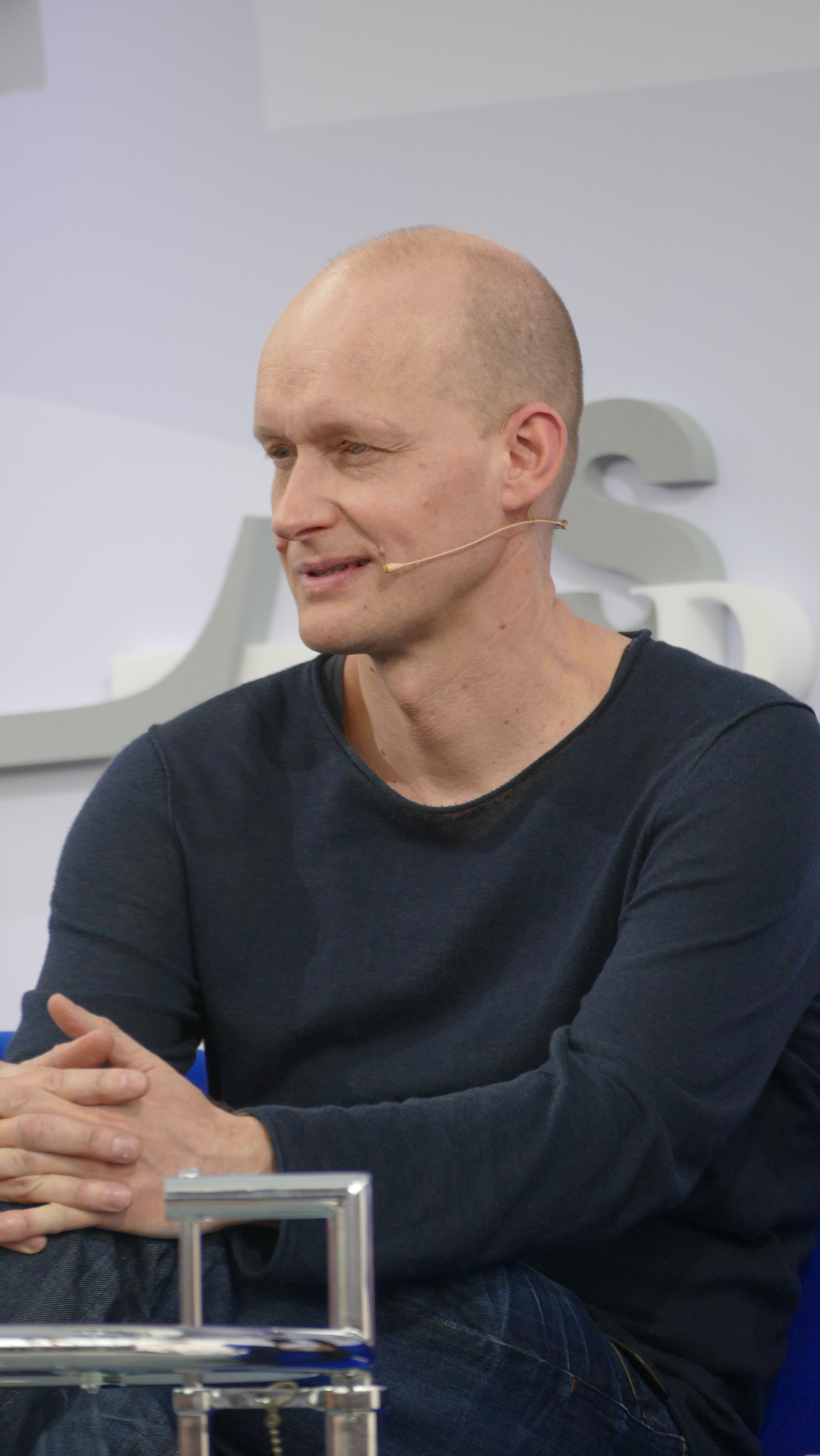 Arno Geiger stellt auf der Leipziger Buchmesse 2018 seinen Roman "Unter der Drachenwand" vor.